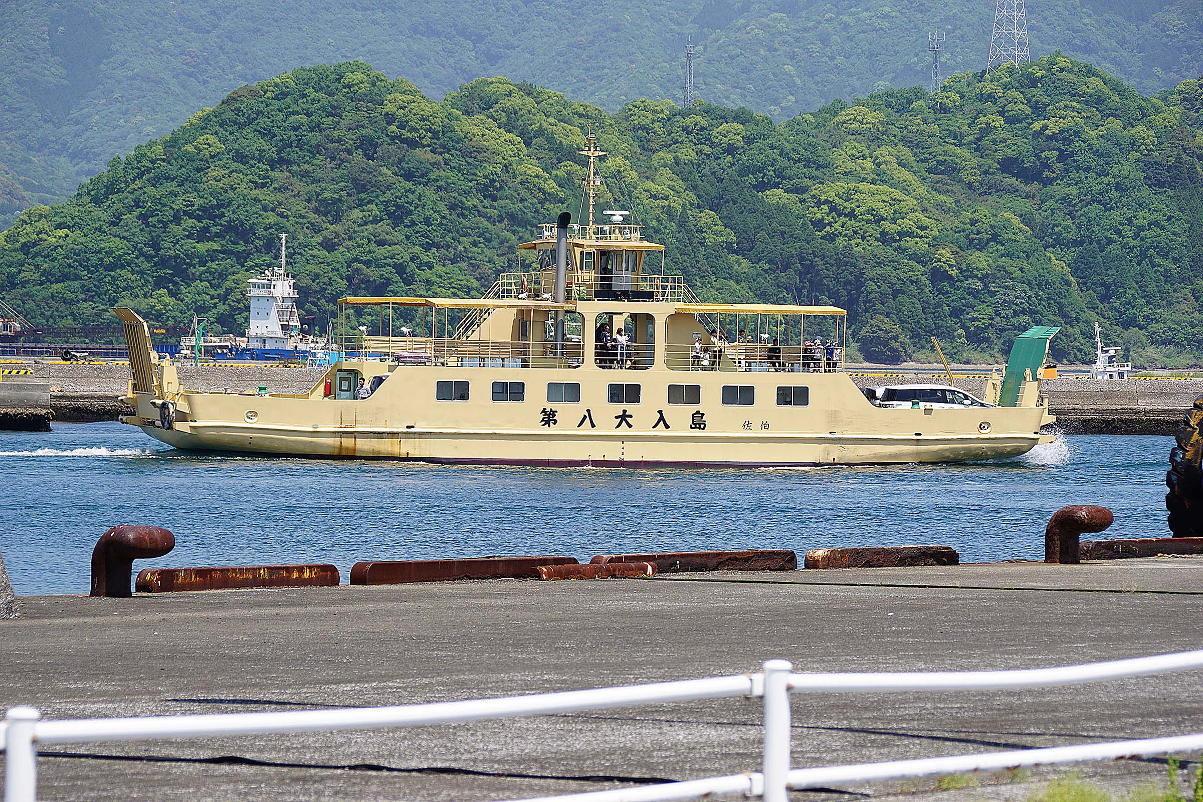 Onyuujima ferry / 大入(おおにゅう)島観光フェリー